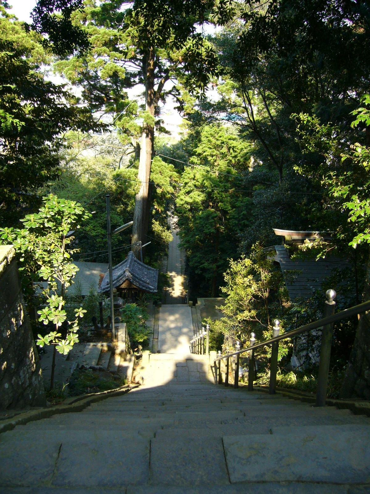 suwa-jinjya-shrine-stairs sawara,katori-city,japan.JPG